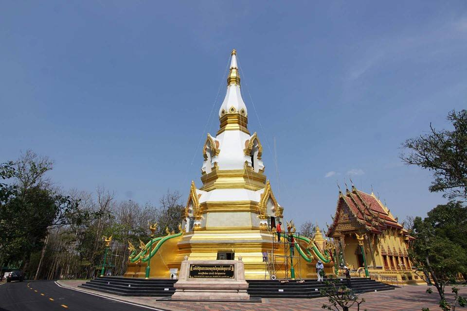 เจดีย์ศรีสุนทรบวรมงคลกุศลไพบูลย์เพิ่มพูนบารมี ณ วัดป่าสุนทราราม